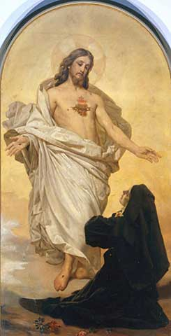 (Marie Marguerite Alacoque; franz.Nonne; 1647-1690; seit 1920 Heilige)